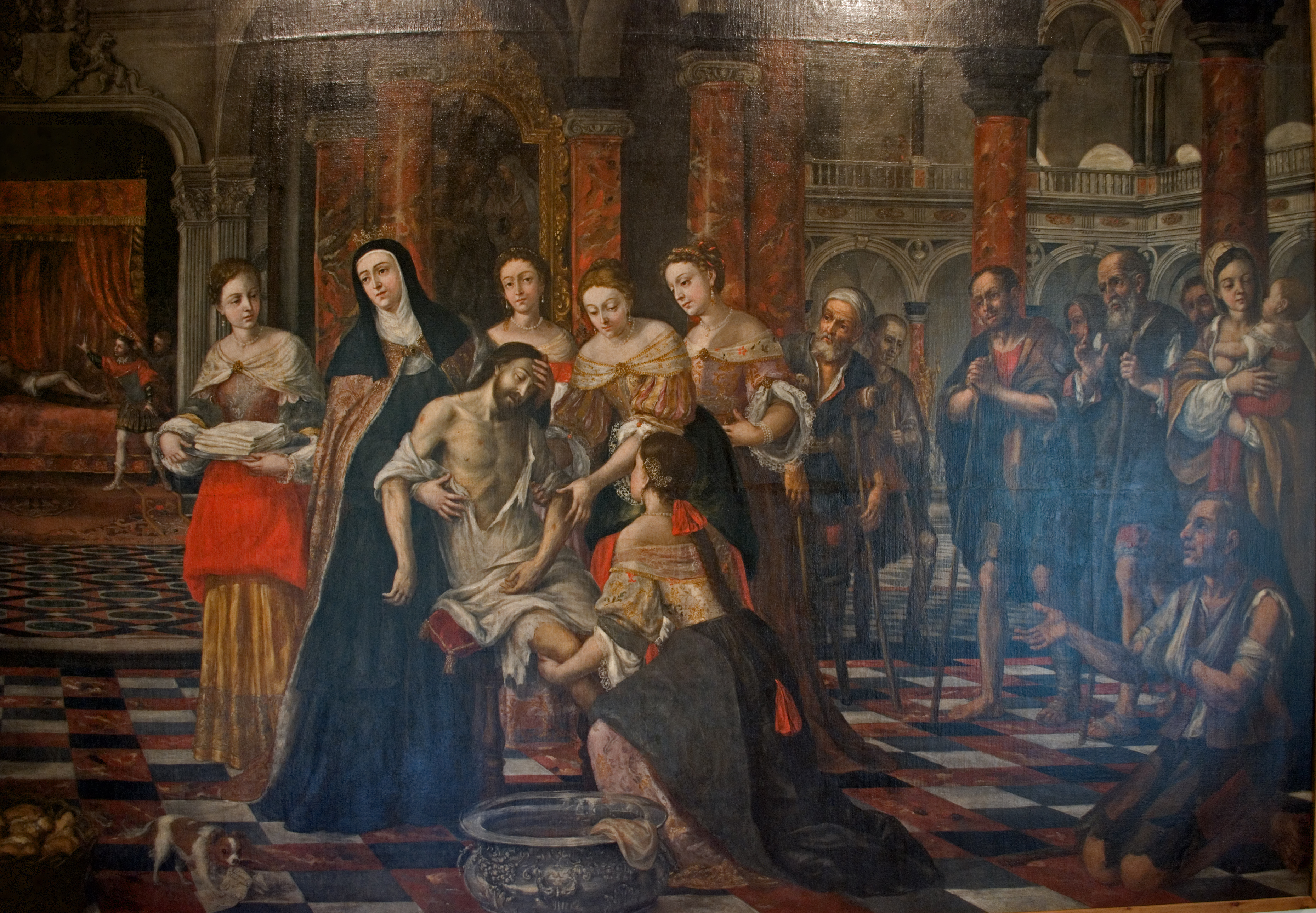 El lienzo muestra a la reina Santa Isabel de Hungría curando enfermos, y la escena se desarrolla en la galeria de un patio, que con toda probabilidad representa el hospital fundado por la reina santa en la ciudad alemana de Marburgo.